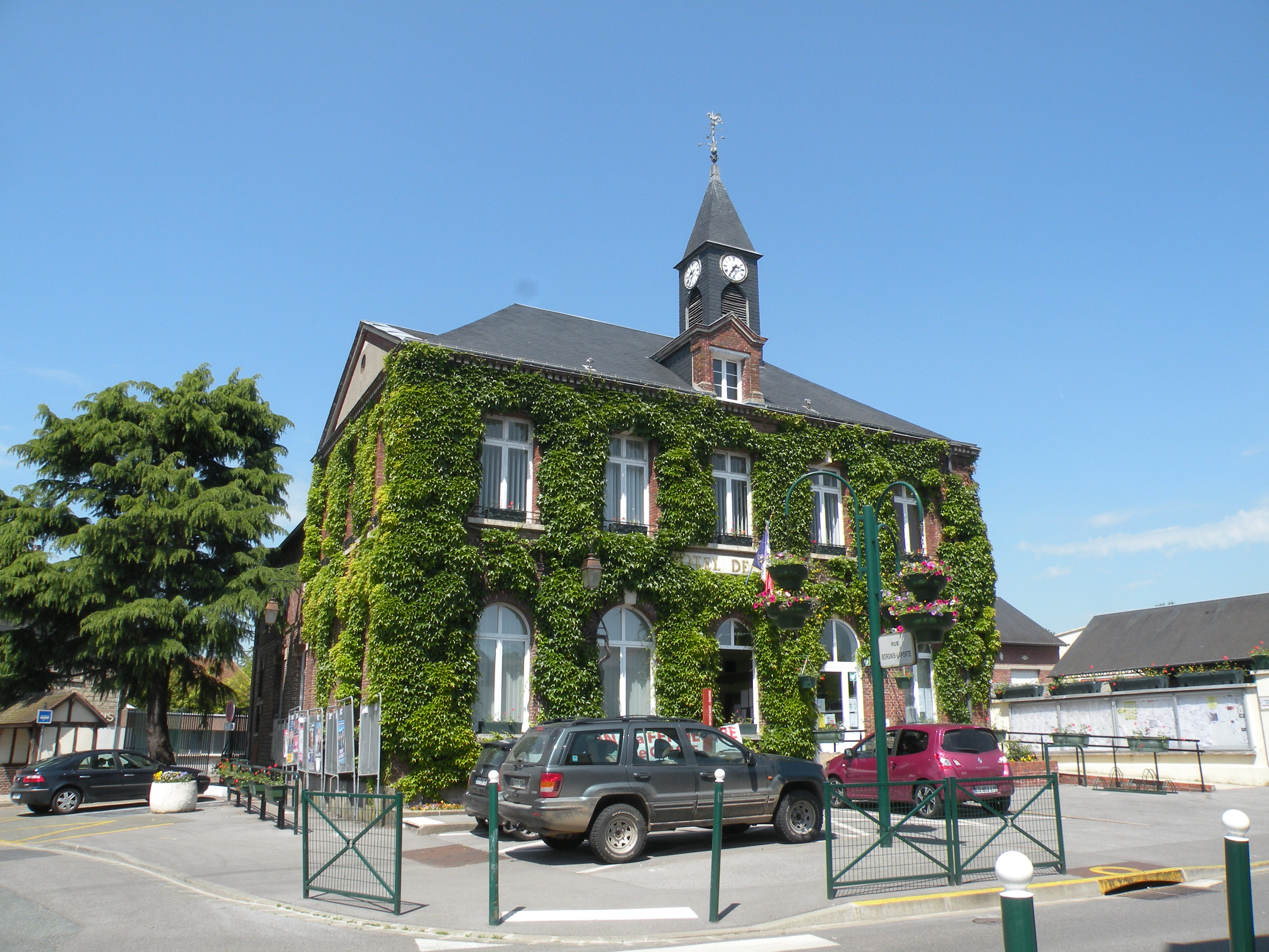 Sérifontaine la mairie